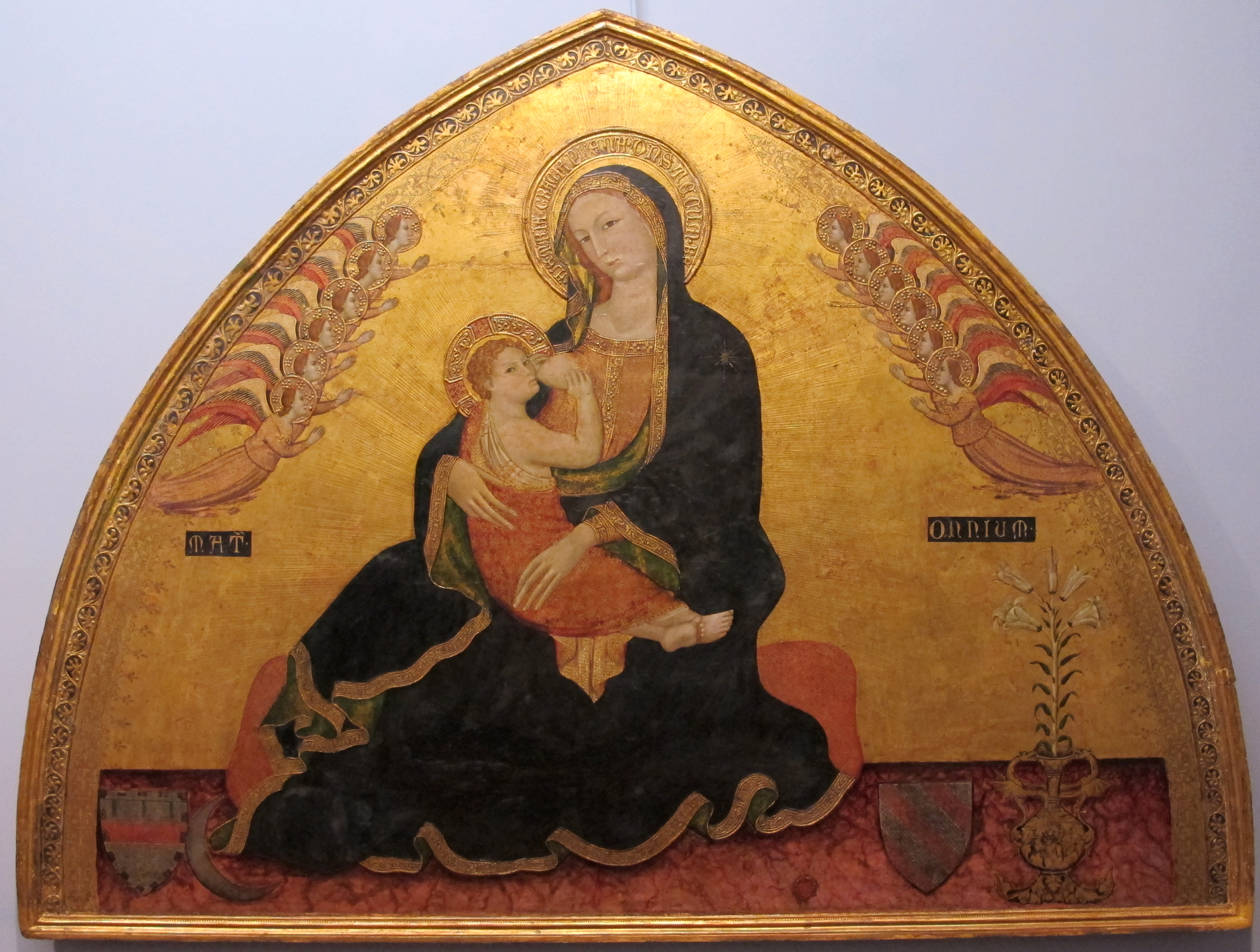 Galleria Napoletana (Museo di Capodimonte)